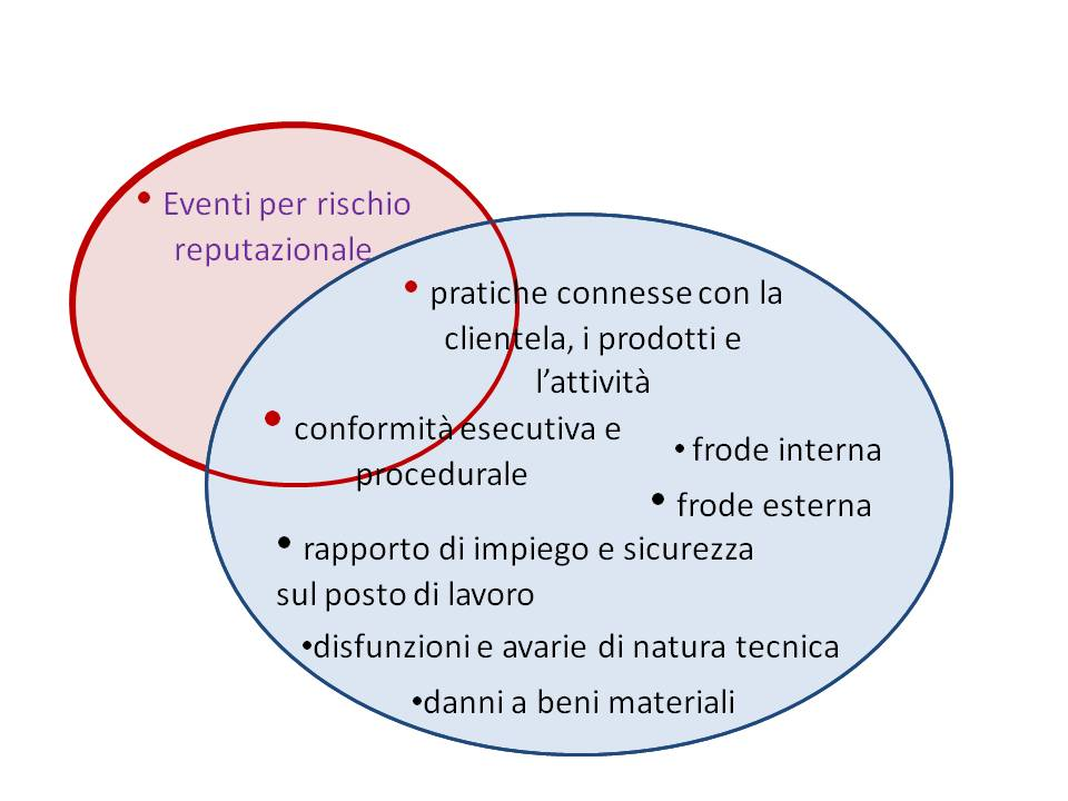 intersezione tra rischio di compliance e rischio operativo